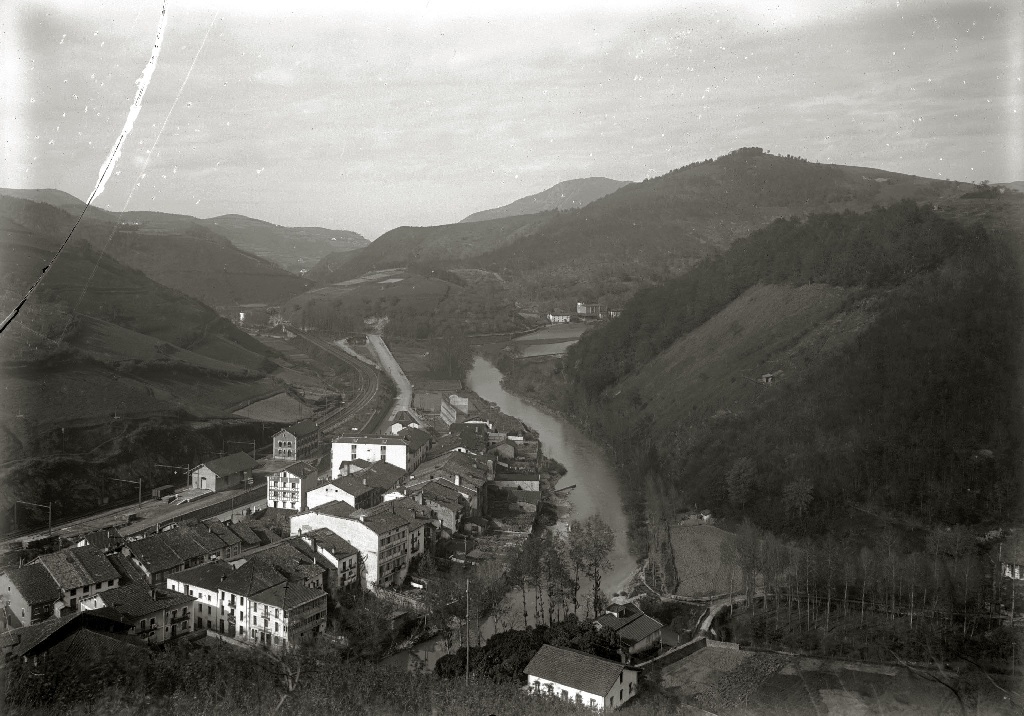 Título original: Vista de la localidad de Alegia (3/3) Localización: Alegría de Oria (Guipúzcoa)